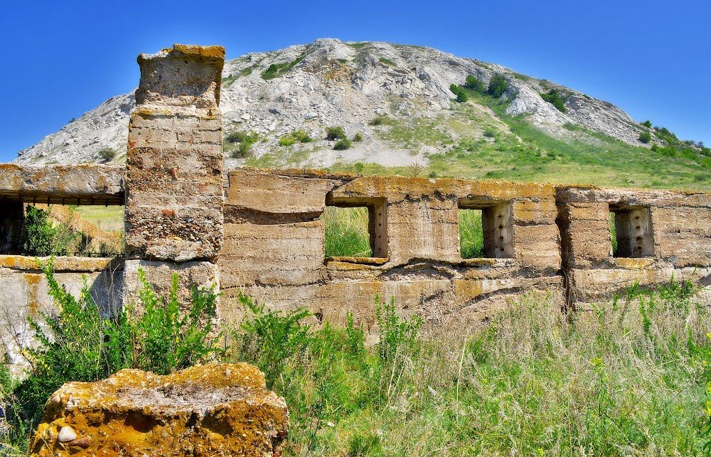 Руины у подножия Торатау